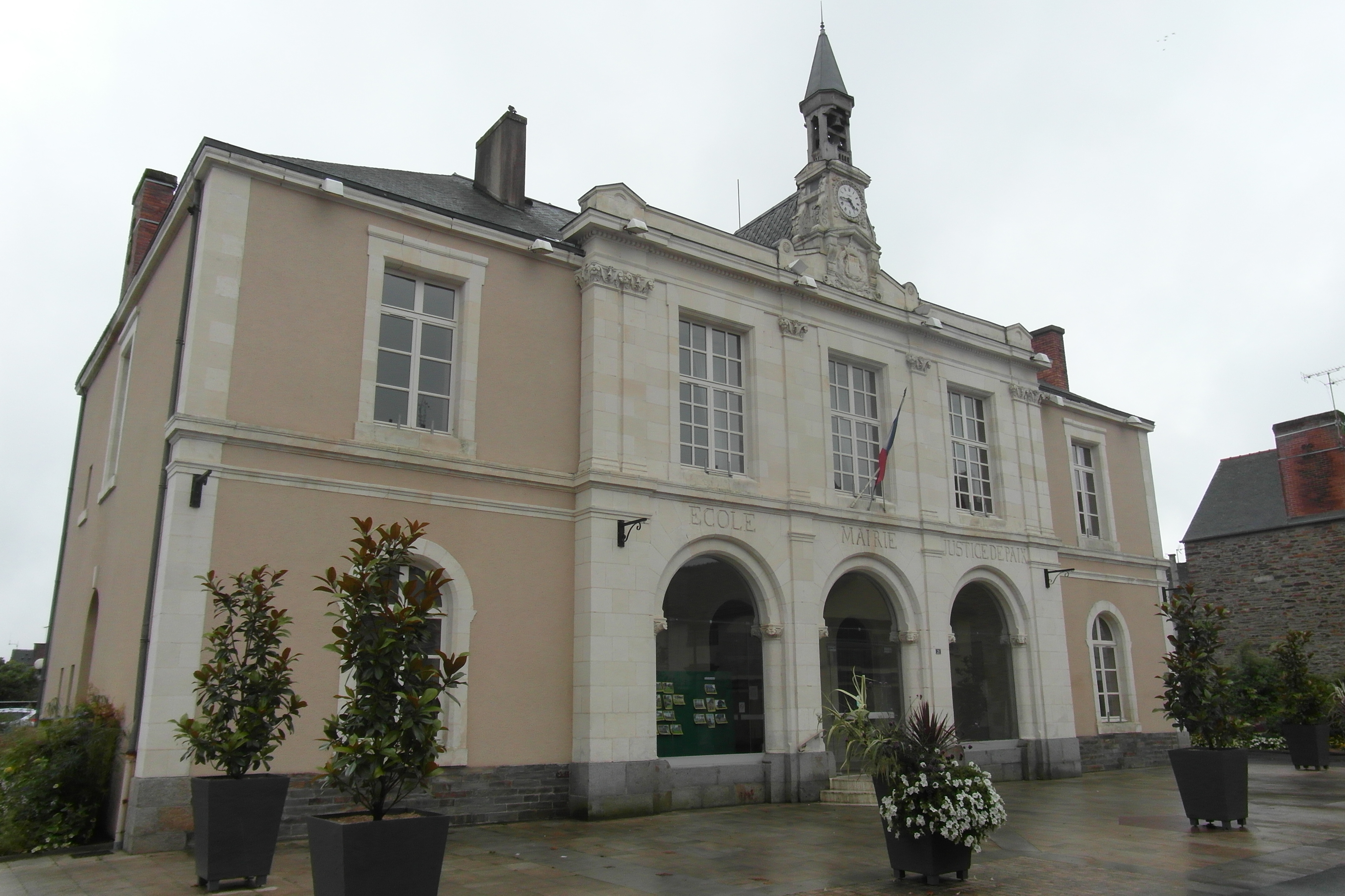 Mairie de Bain-de-Bretagne en 2012.